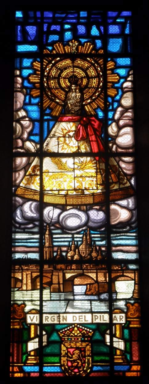 Iglesia de Nuestra Señora del Carmen (Oviedo)